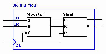 Een flip-flop bestaat uit 2 transparante latches.